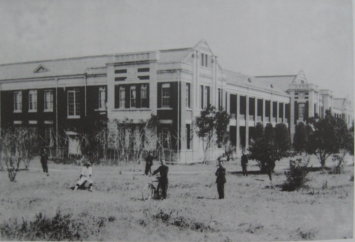 自西南方拍攝的臺中一中日治時期校舍